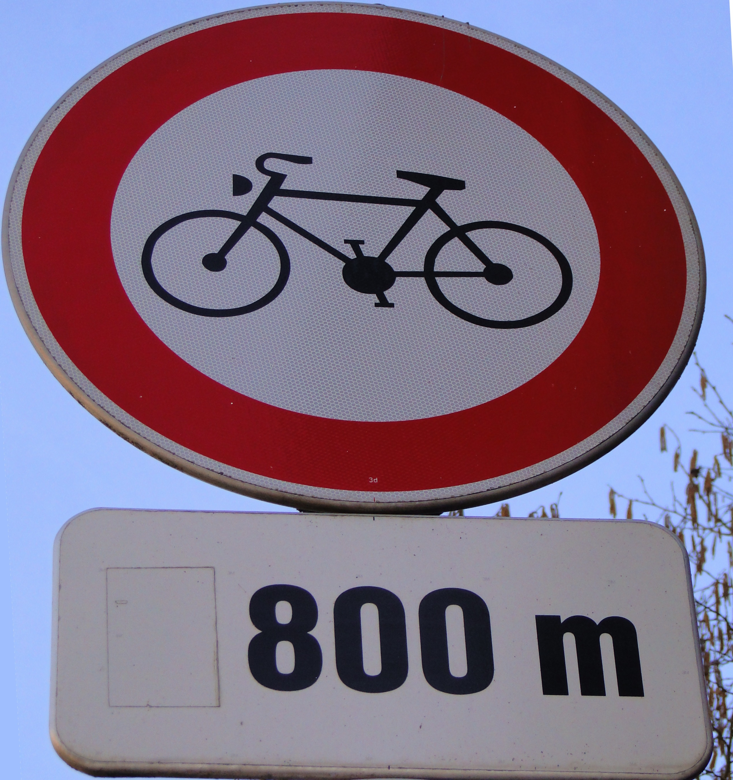 Verkéiersschëld C,3c "Verbuede fir Chauffere vu Vëloen" aus dem lëtzebuerger Code de la Route; zesumme mam Zousazschëld Modell 3a.